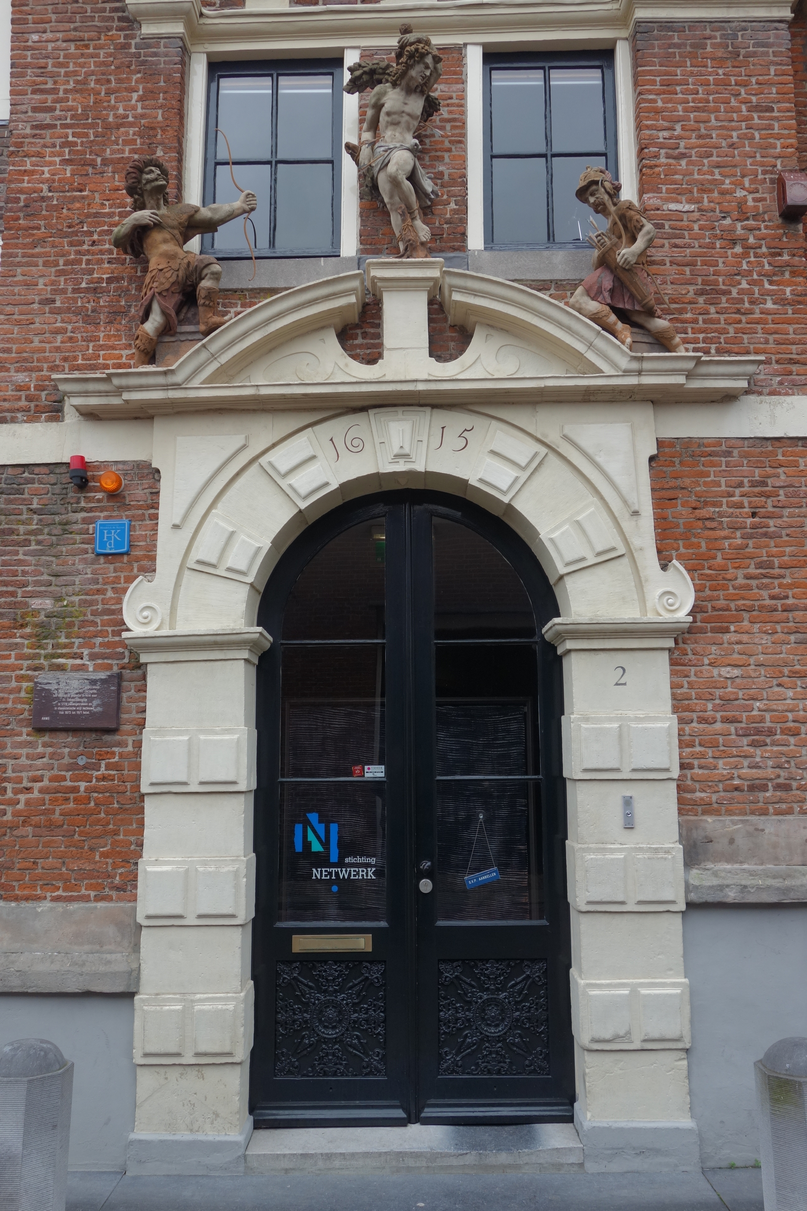 Poortje van het Doelengebouw in Hoorn.